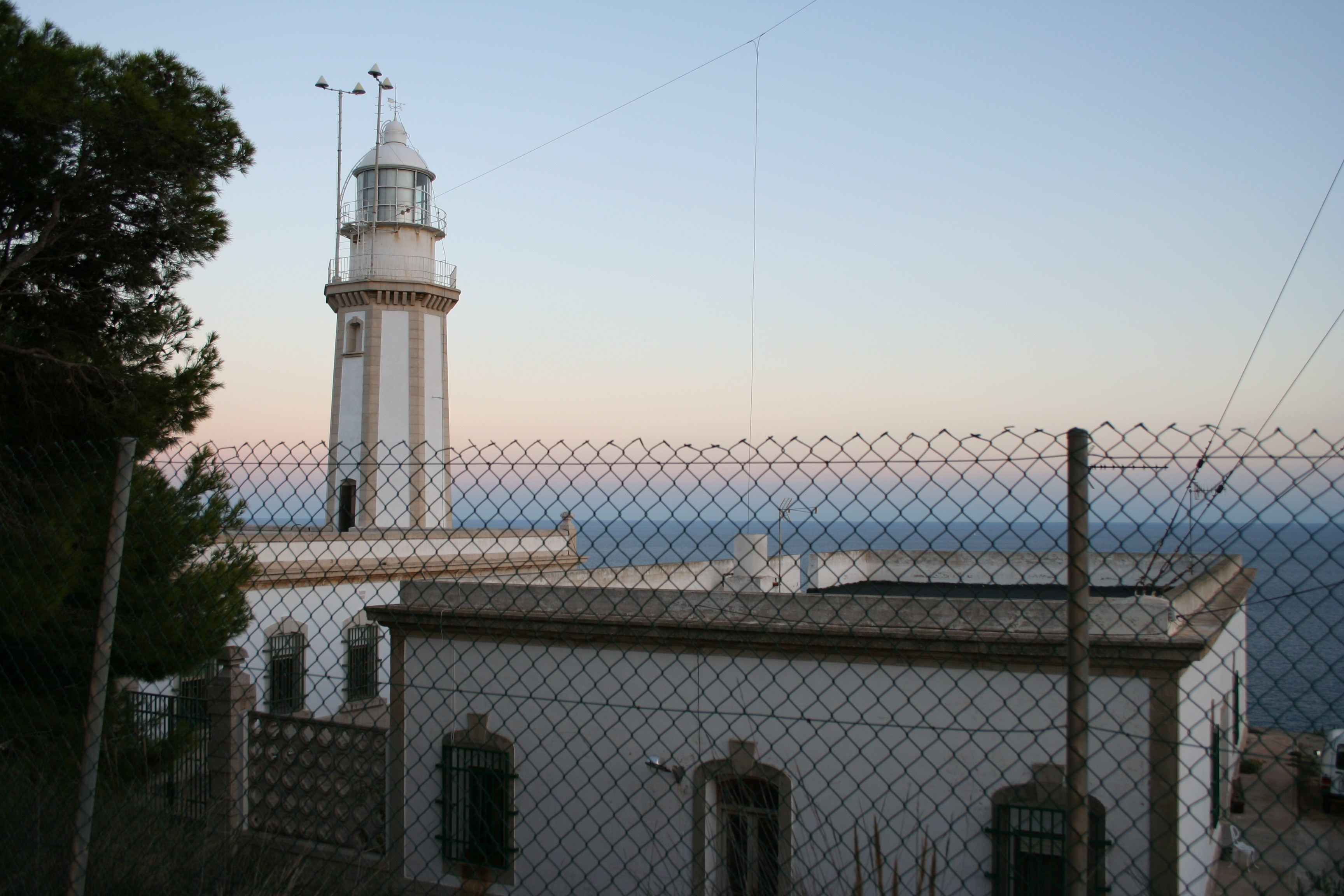 Faro del cabo de La Nao